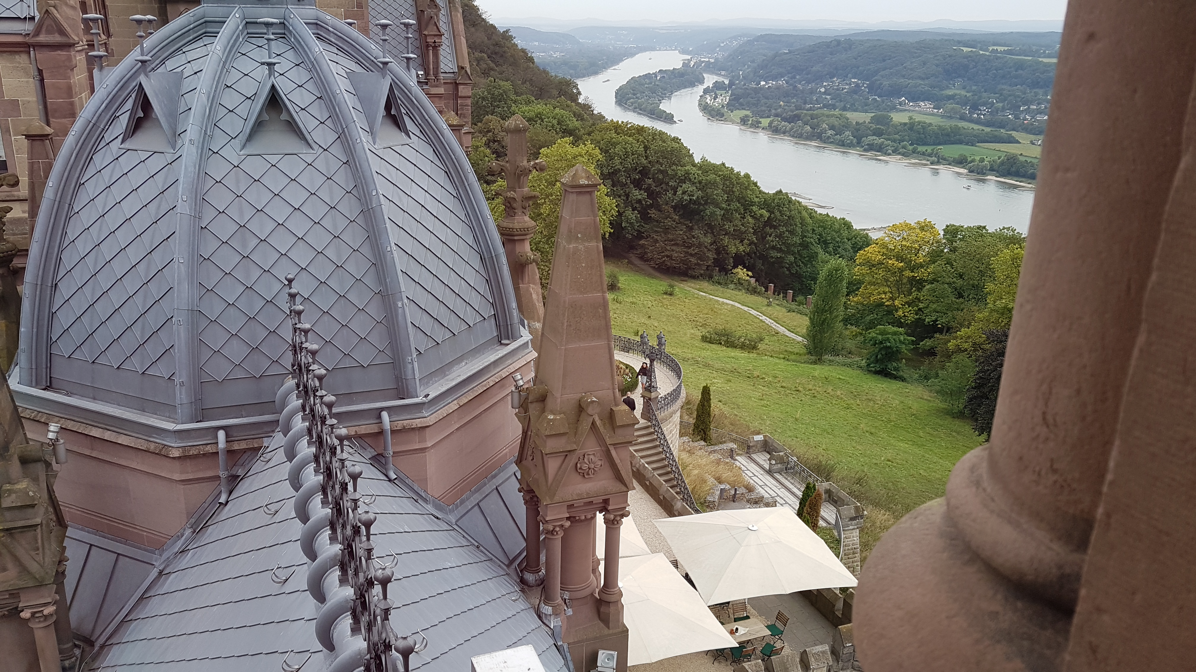 Teil der Drachenburg in Königswinter mit Sicht auf die Restaurantterrasse, den Park und den Rhein.This is a photograph of an architectural monument., no. A51